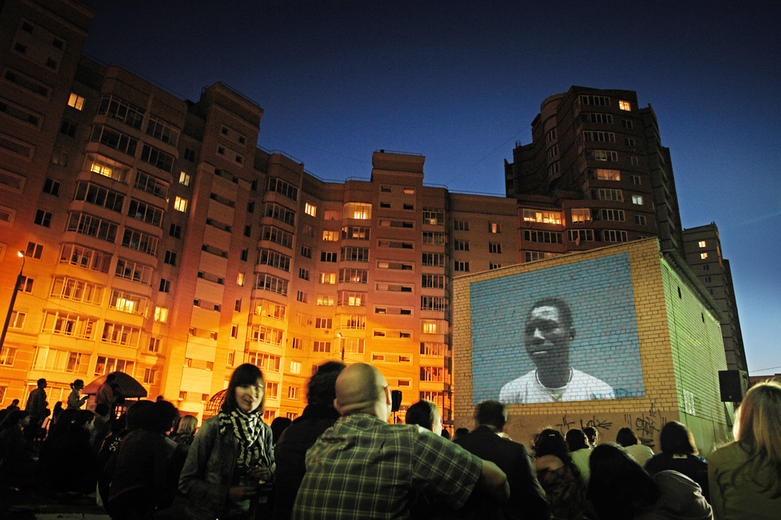 показ видеоарта "Пусто", фестиваль "Архитектура движения", Ярославль, 4 сентября 2009